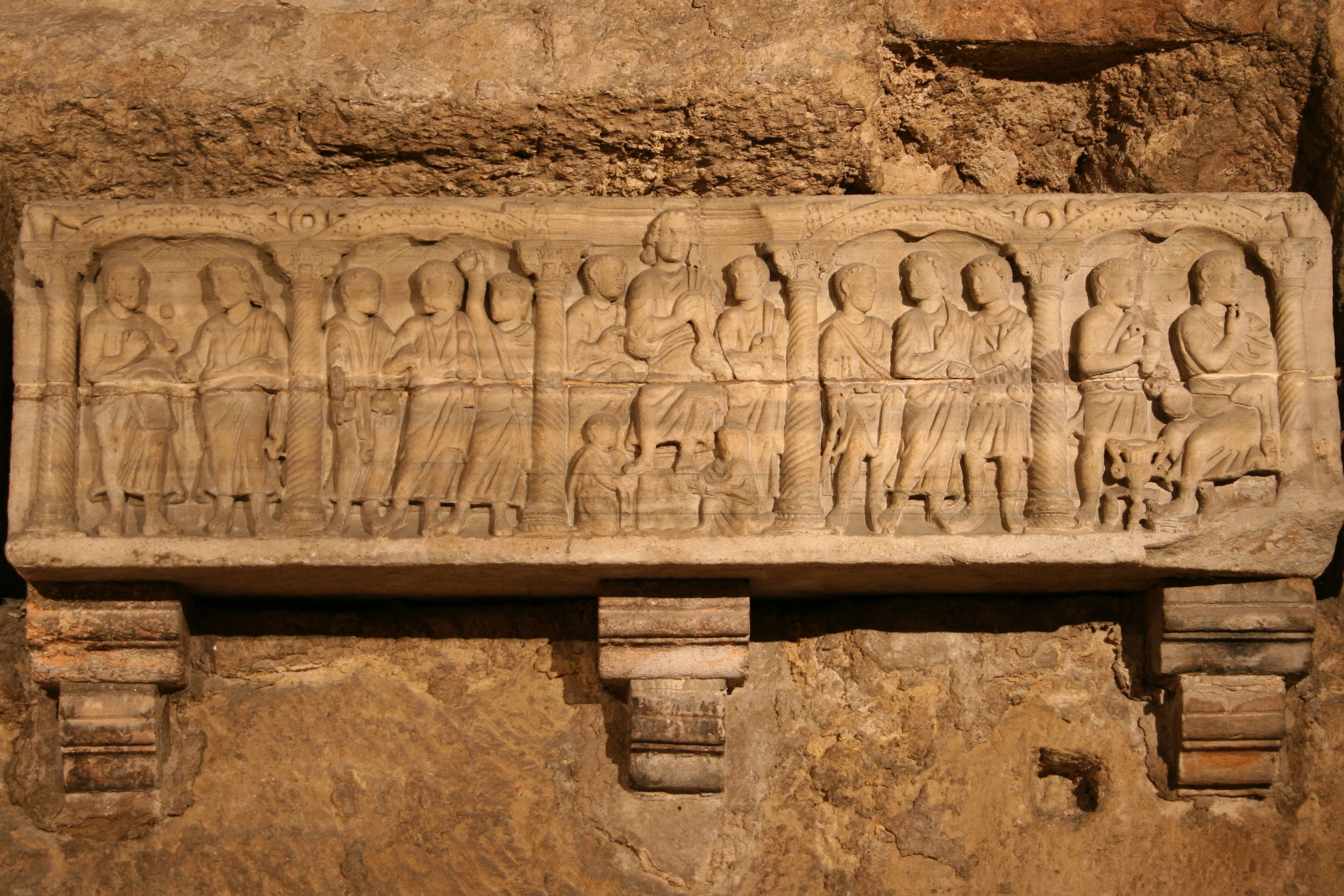 sarcophage des compagnons de Saint-Maurice de la fin du IVe siècle en marbre de Carrare situé dans les cryptes de l'abbaye de Saint-Victor à Marseille.